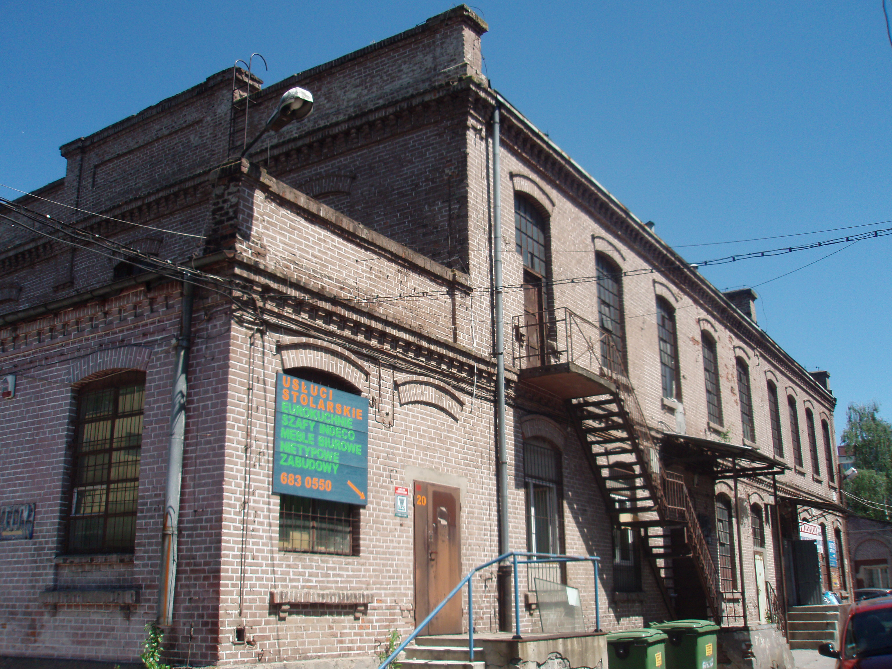 Obiekt w kompleksie przemysłowym przy ul. Rzgowskiej 26/28